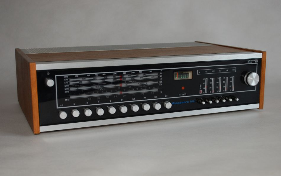 Tuner TST-102 Kleopatra hi fi